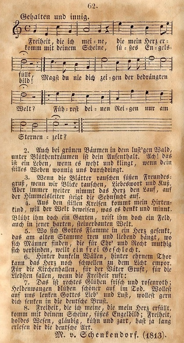 Freiheit, die ich meine, Erstdruck mit der rezipierten Melodie von Karl August Groos (1818/1825)